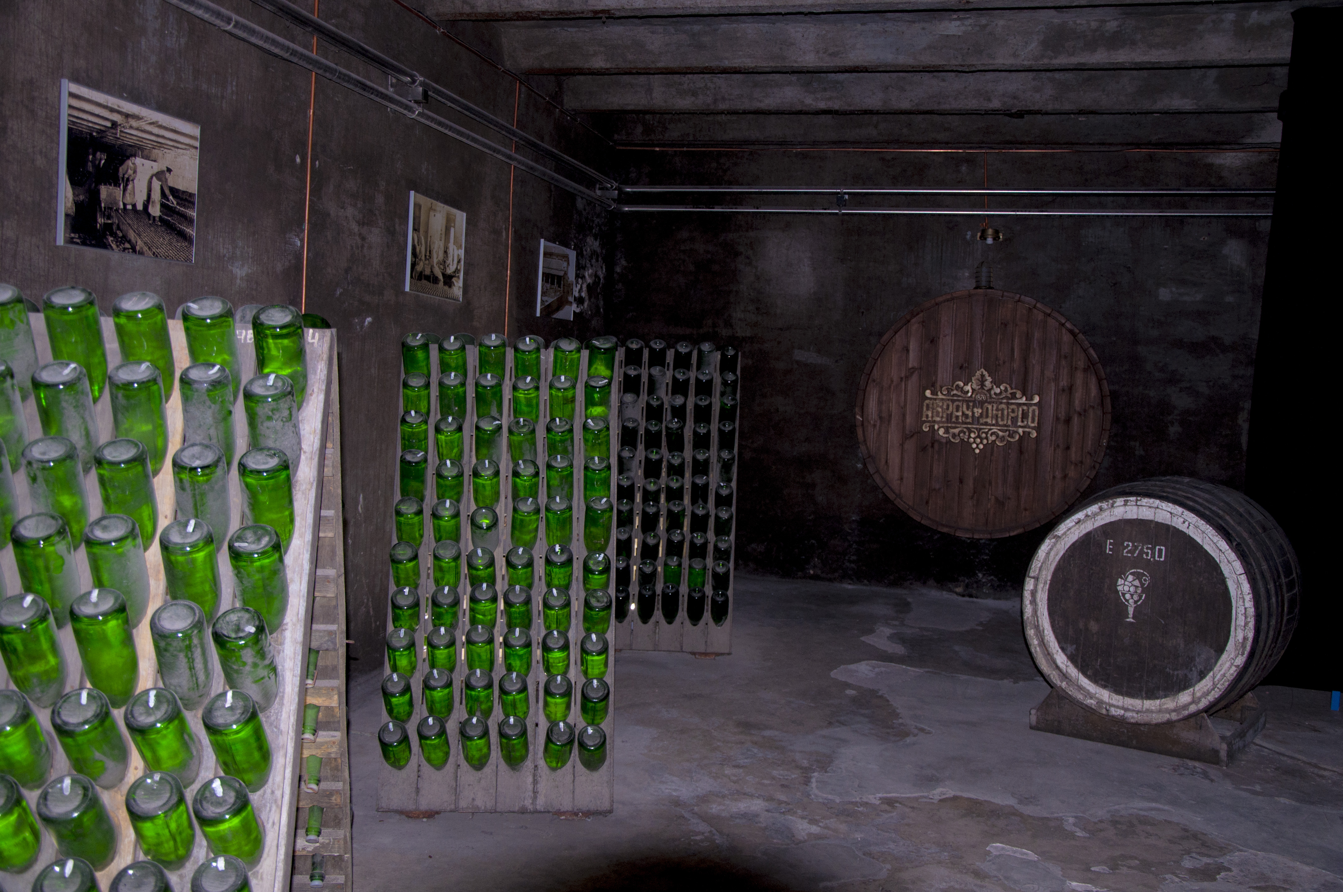 Abrau-Dyurso, Krasnodar Krai, Russia, 353995